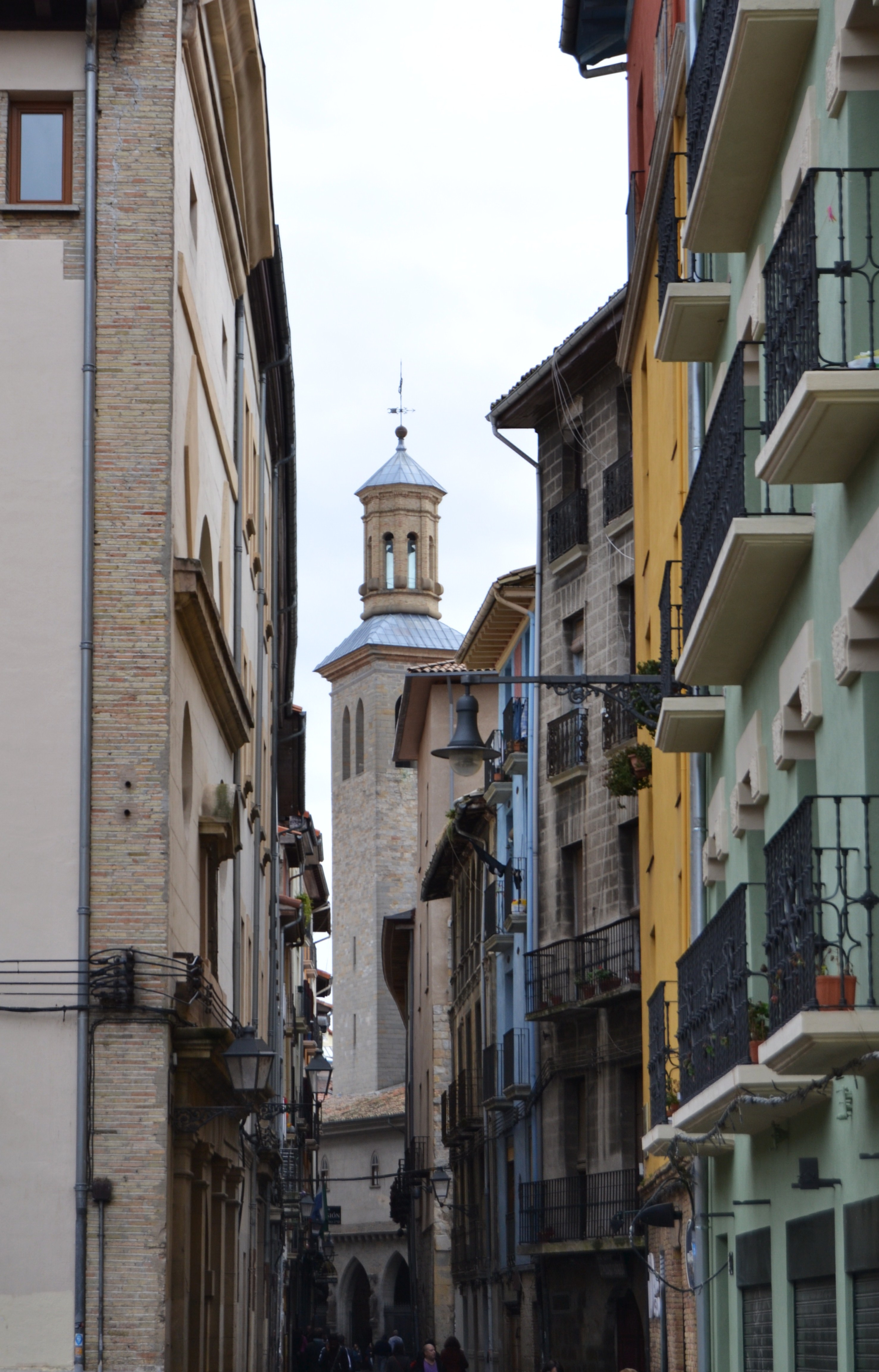 Carrer Joaquín Jarauta, Pamplona.